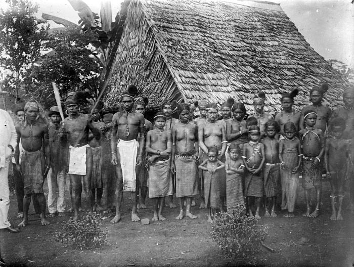 Repronegatief. Alfuren uit de bergen van Ceram